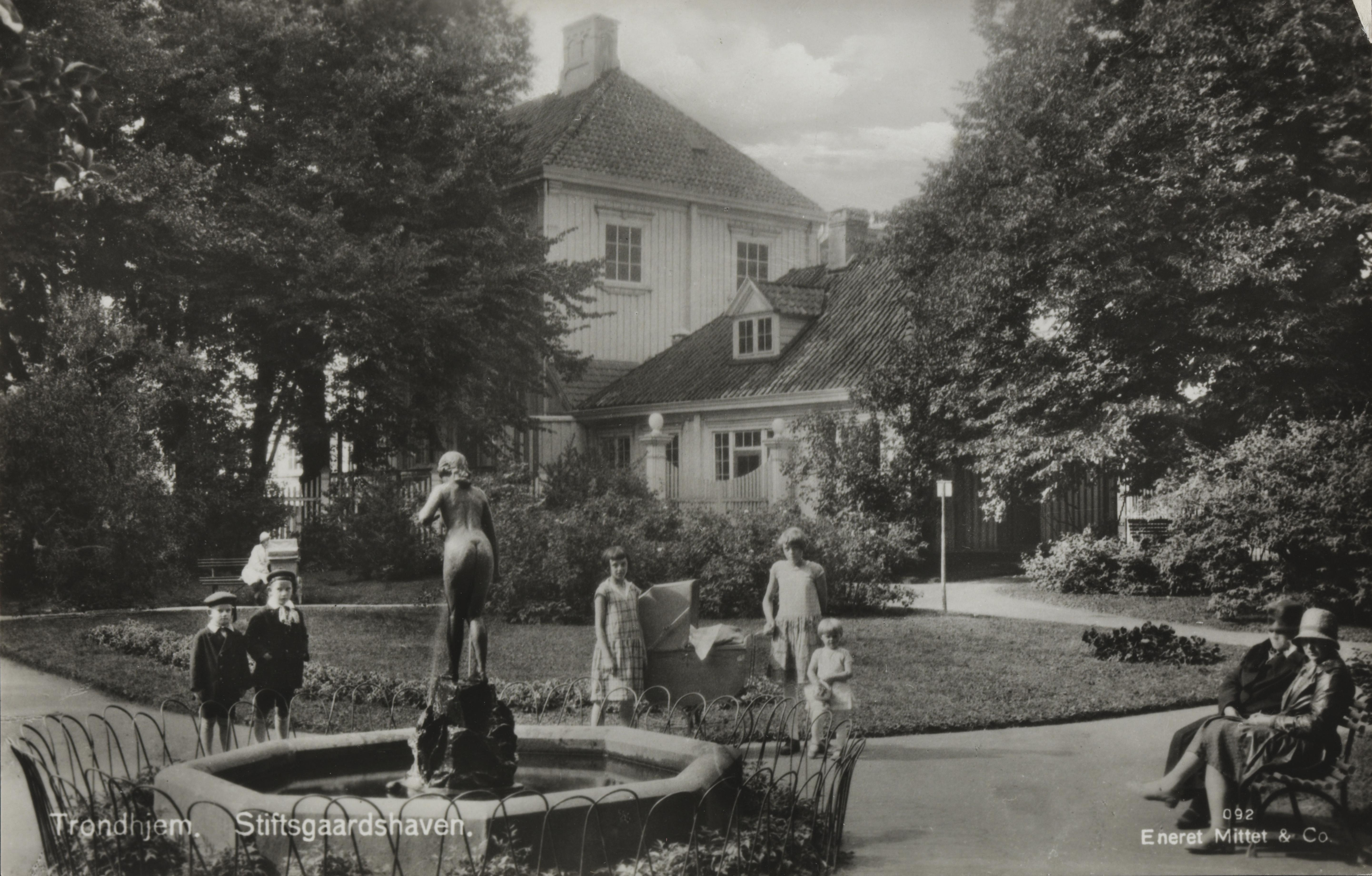 Bildet er hentet fra Nasjonalbibliotekets bildesamling Midtbyen,Munkegata,Stiftsgården, Trondheim, Sør Trøndelag